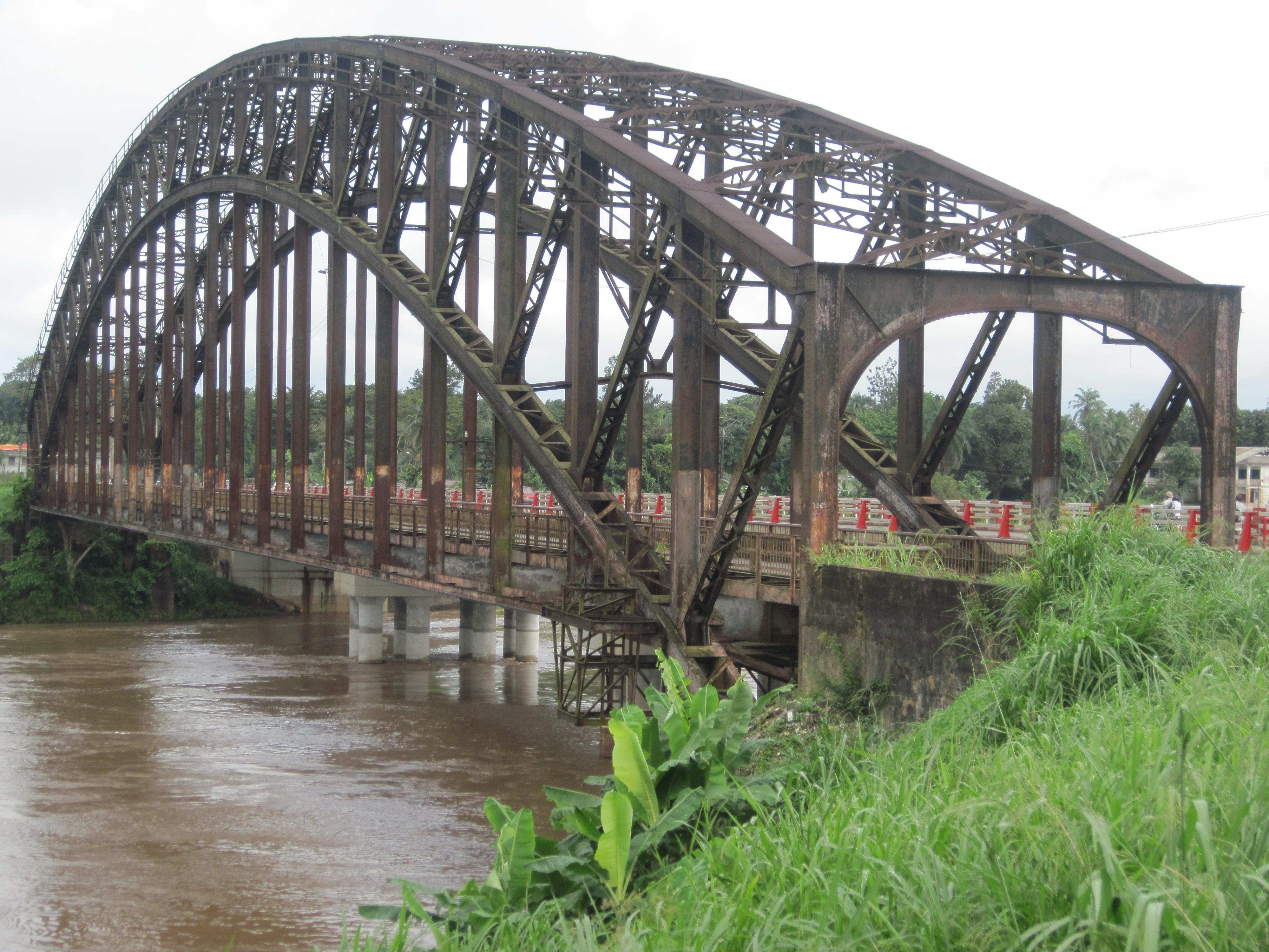 Photo prise dans le jardin entrée COPRO